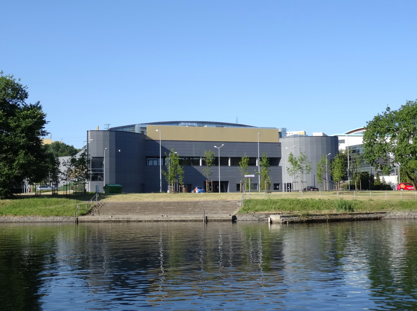 Hala widowiskowo-sportowa Artego Arena w Bydgoszczy